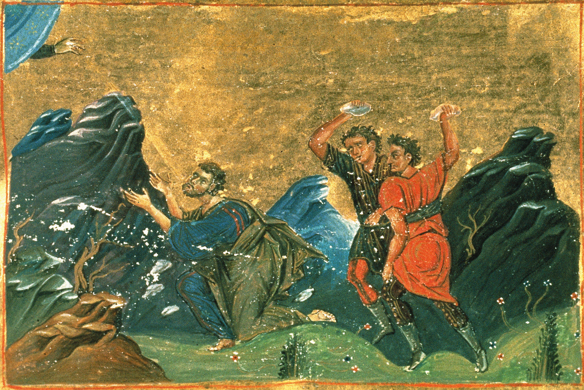 Святитель Анания , епископ Дамасский, апостол от 70-ти, сщмч.